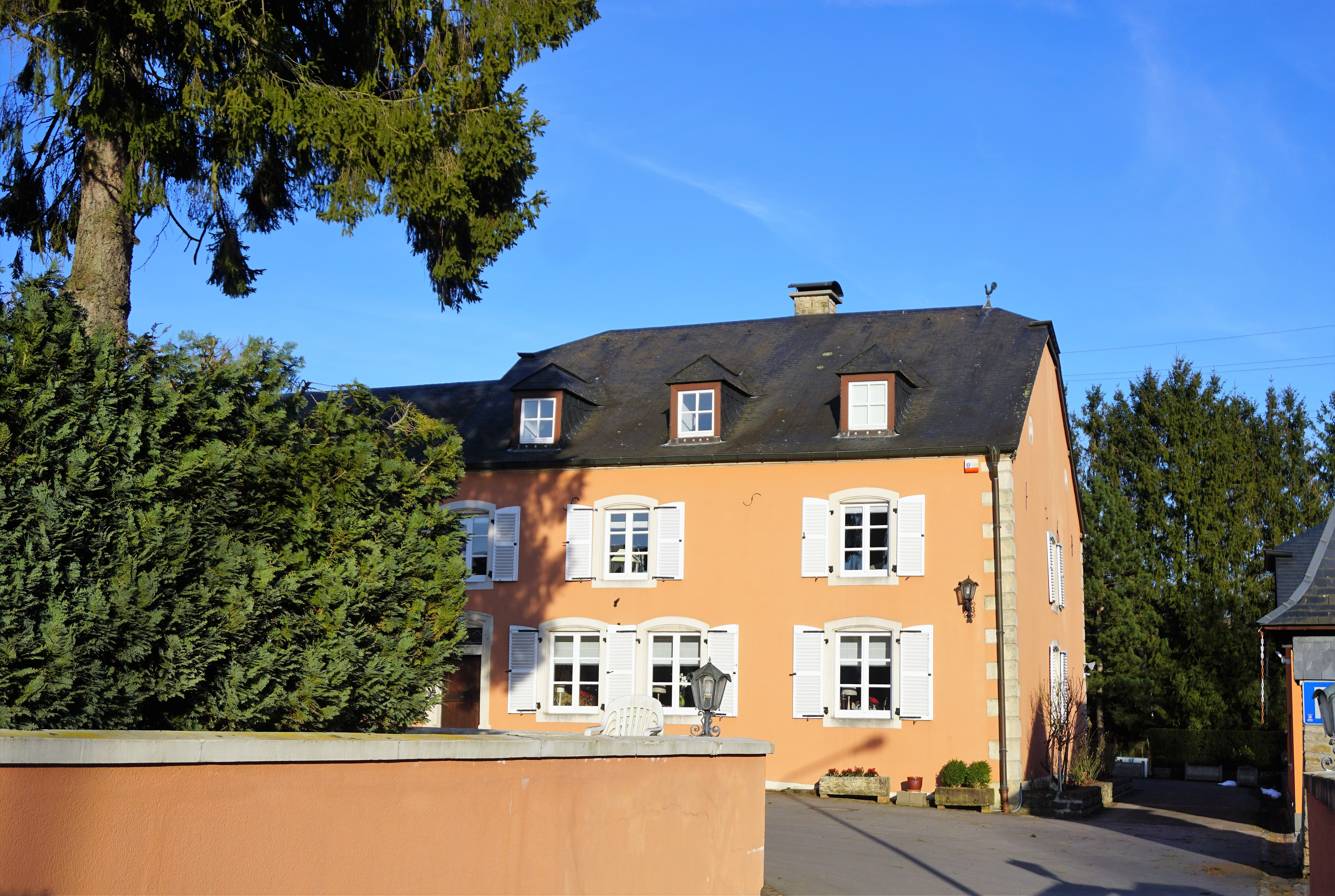 Leudelange, ancienne ferme Schlewenhof (Schléiwenhaff).